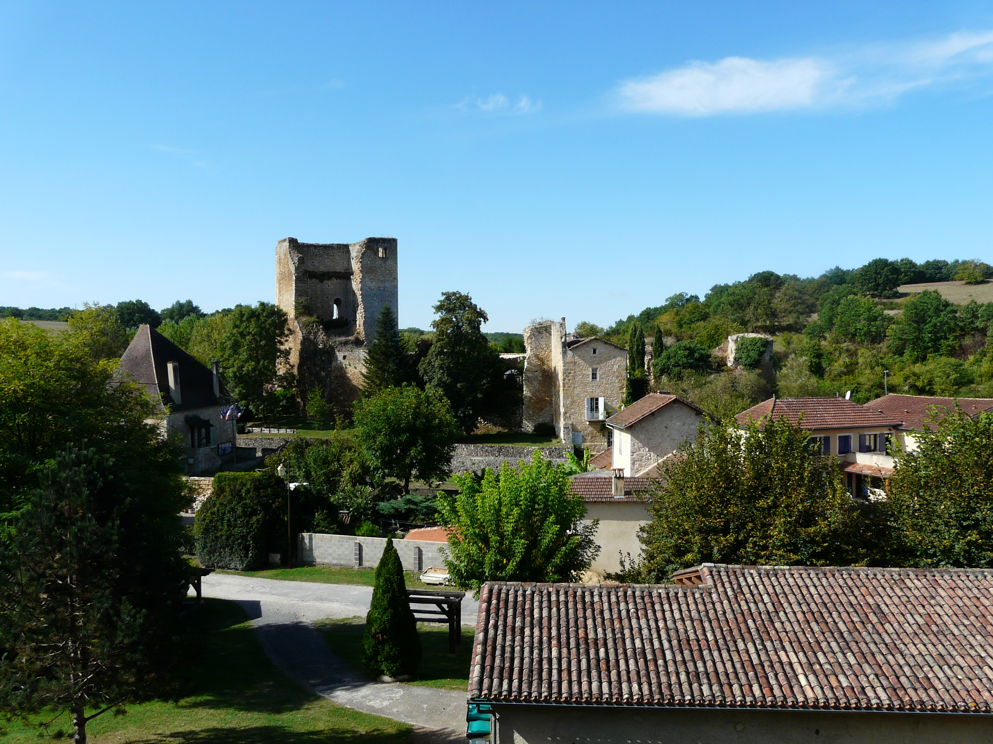 Le bourg de Cause-de-Clérans, Dordogne, France.